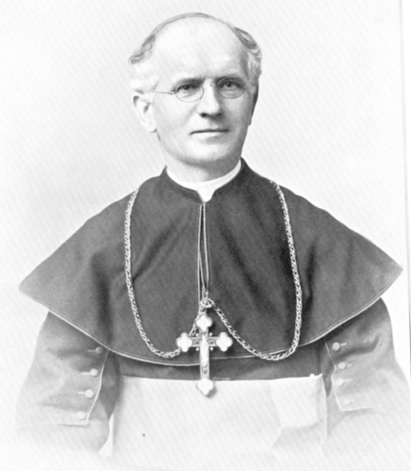 Bild des Bischofs von Regensburg und Passau Anton von Henle